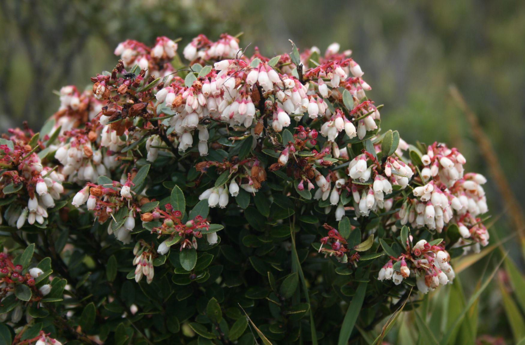 Vaccinium floribundum, Heidekrautgewächse (Ericaceae) - Costa Rica: Prov. Cartago, Cordillera de Talamanca, Fahrweg E Carretera Interamericana, N Cerro Sákira, ca. 3200 m